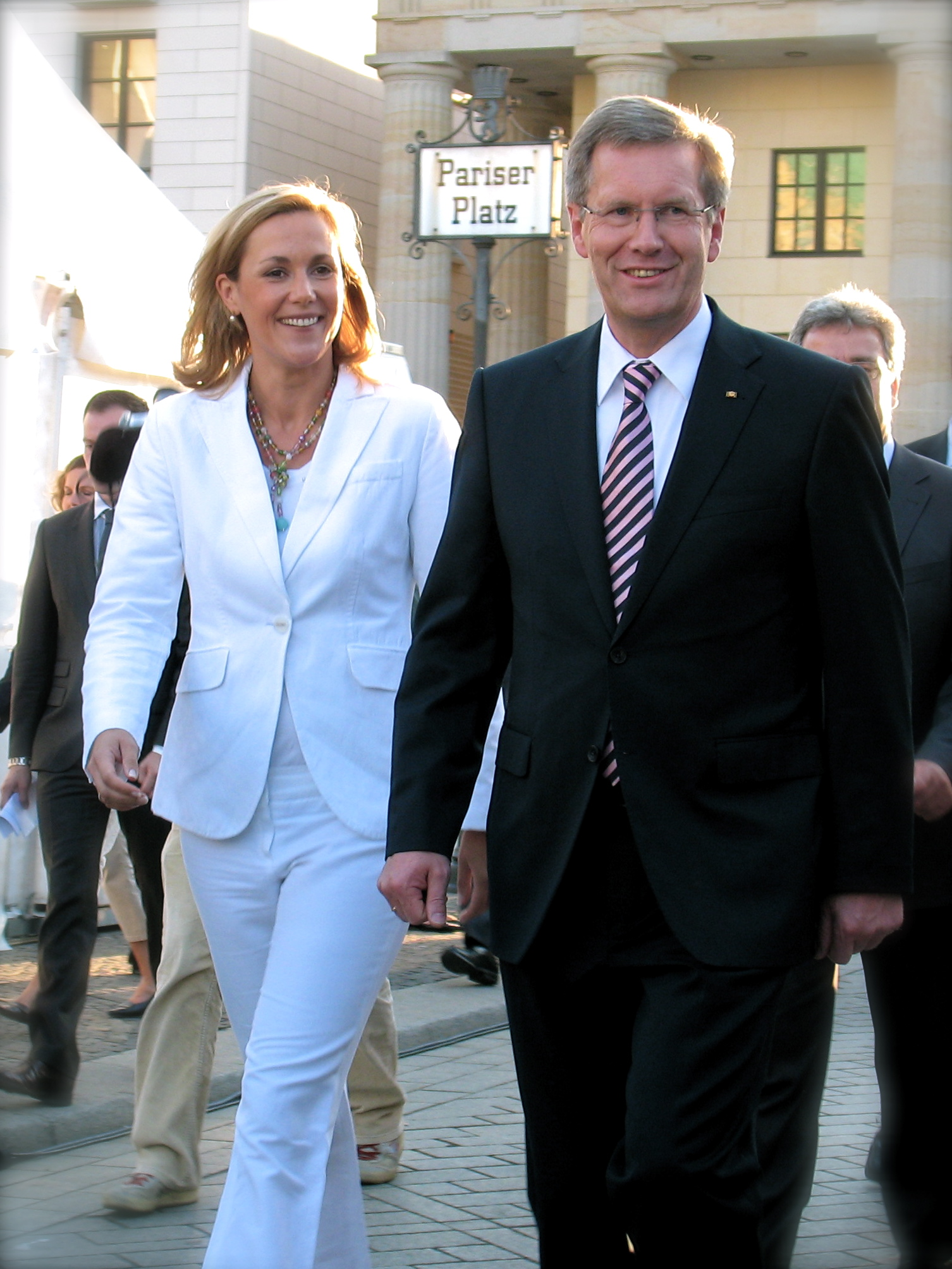 Der Bundespräsident Christian Wulff und seine Frau Bettina Wulff auf dem Pariser Platz in Berlin